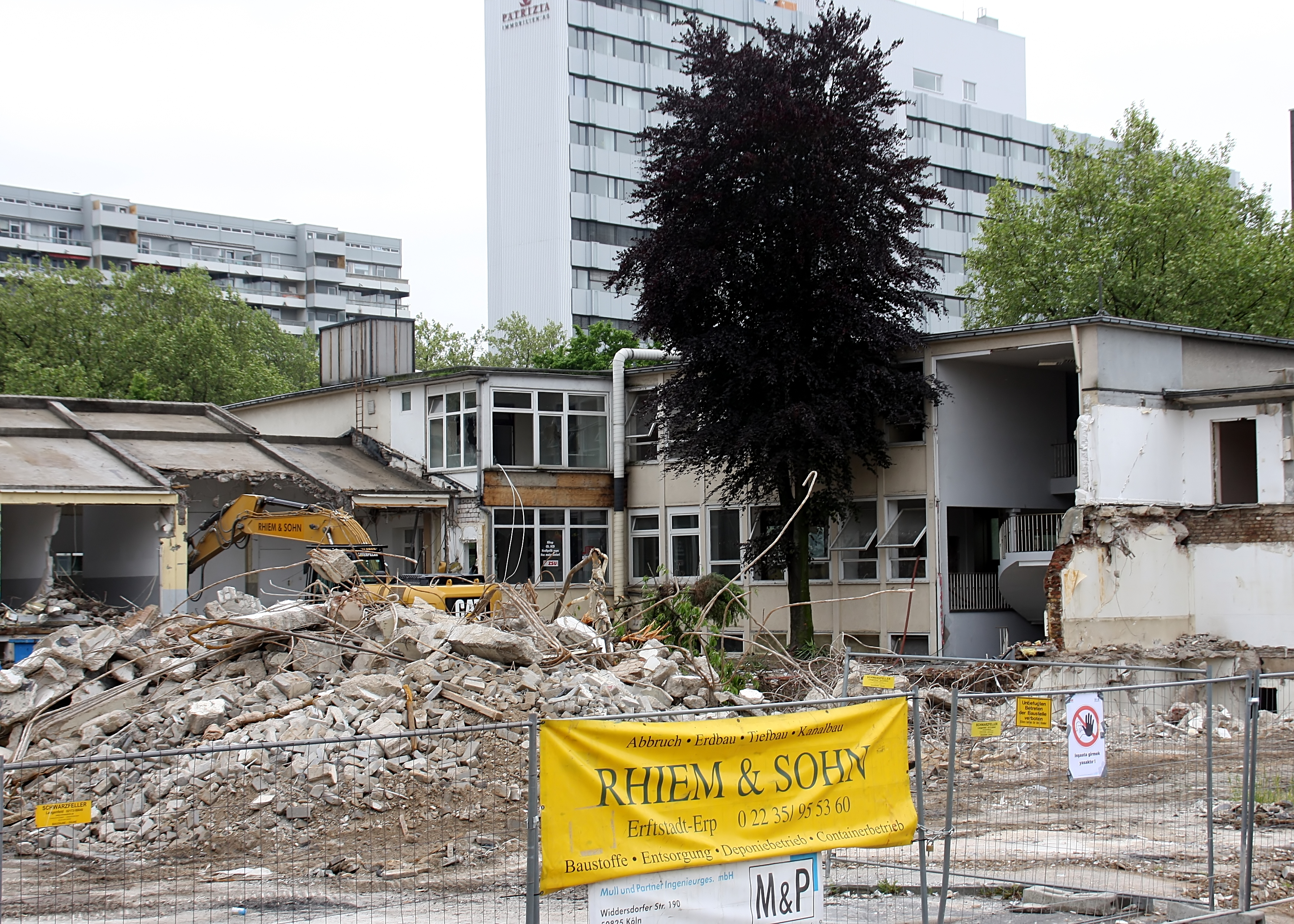 Abriss des alten Moscheegebäudes in Köln-Ehrenfeld. An dieser Stelle wird die DITIB-Zentralmoschee errichtet.